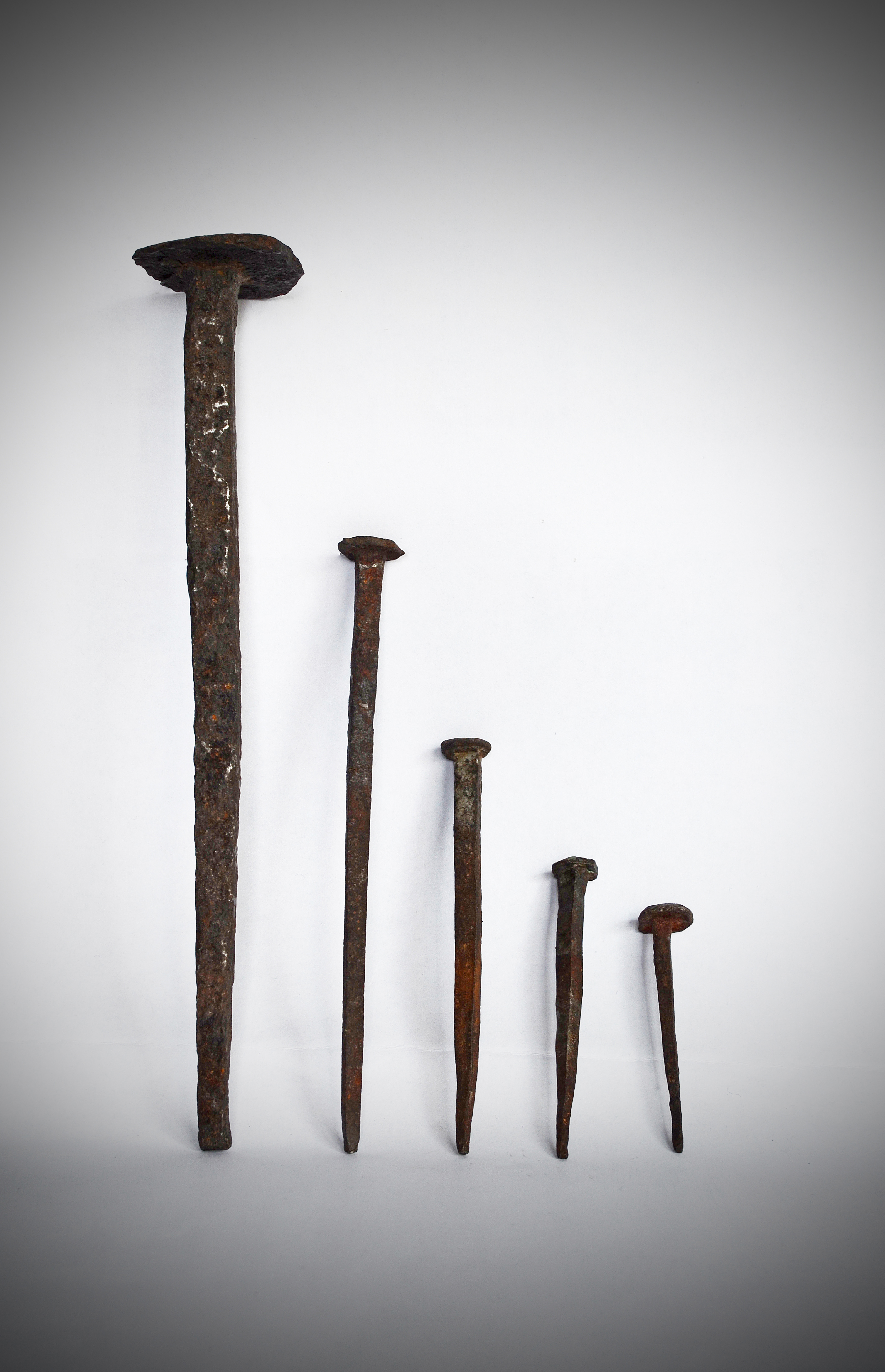 Гвозди кованые,Россия,Рязанская губерния.